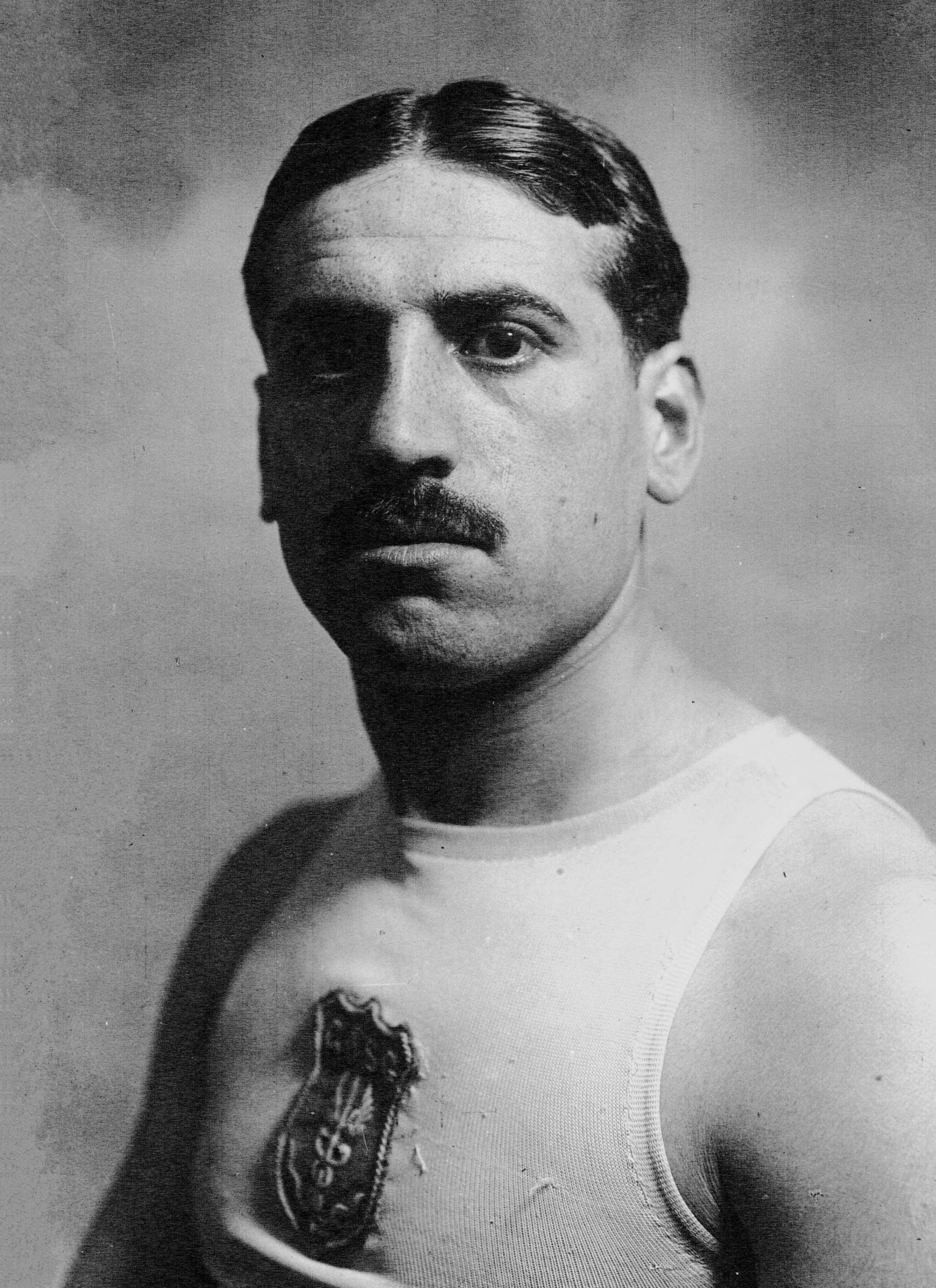 Jean Bouin, champion de course à pied.